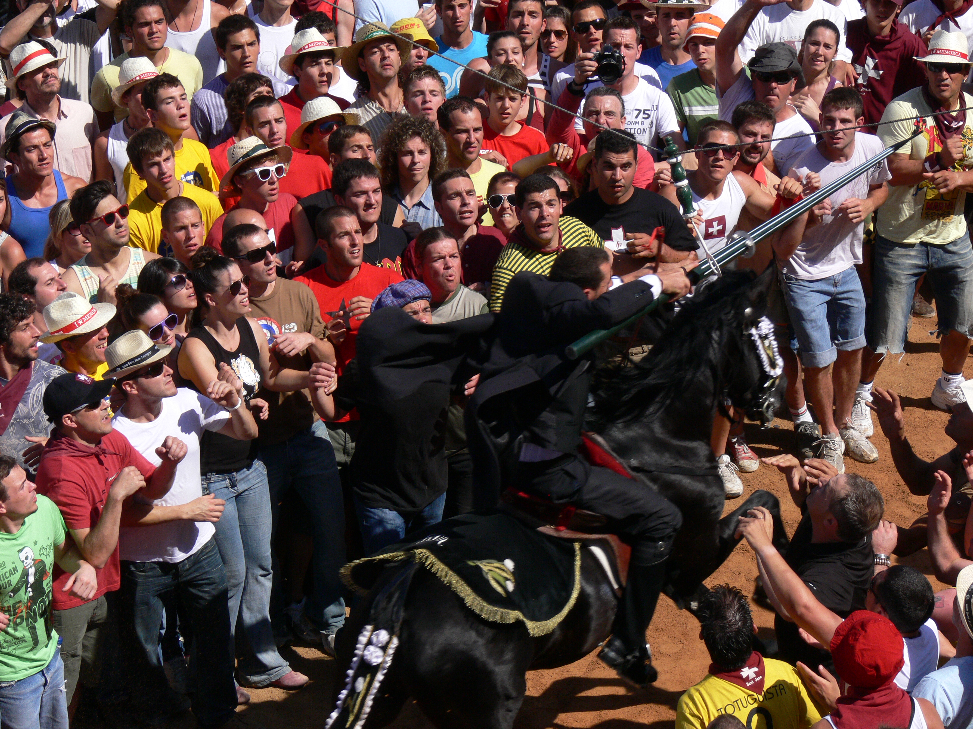 "Córrer s'ensortilla" (en original lengua catalana) -correr la sortija- en las fiestas de Sant Joan en Ciutadella de Menorca (España)